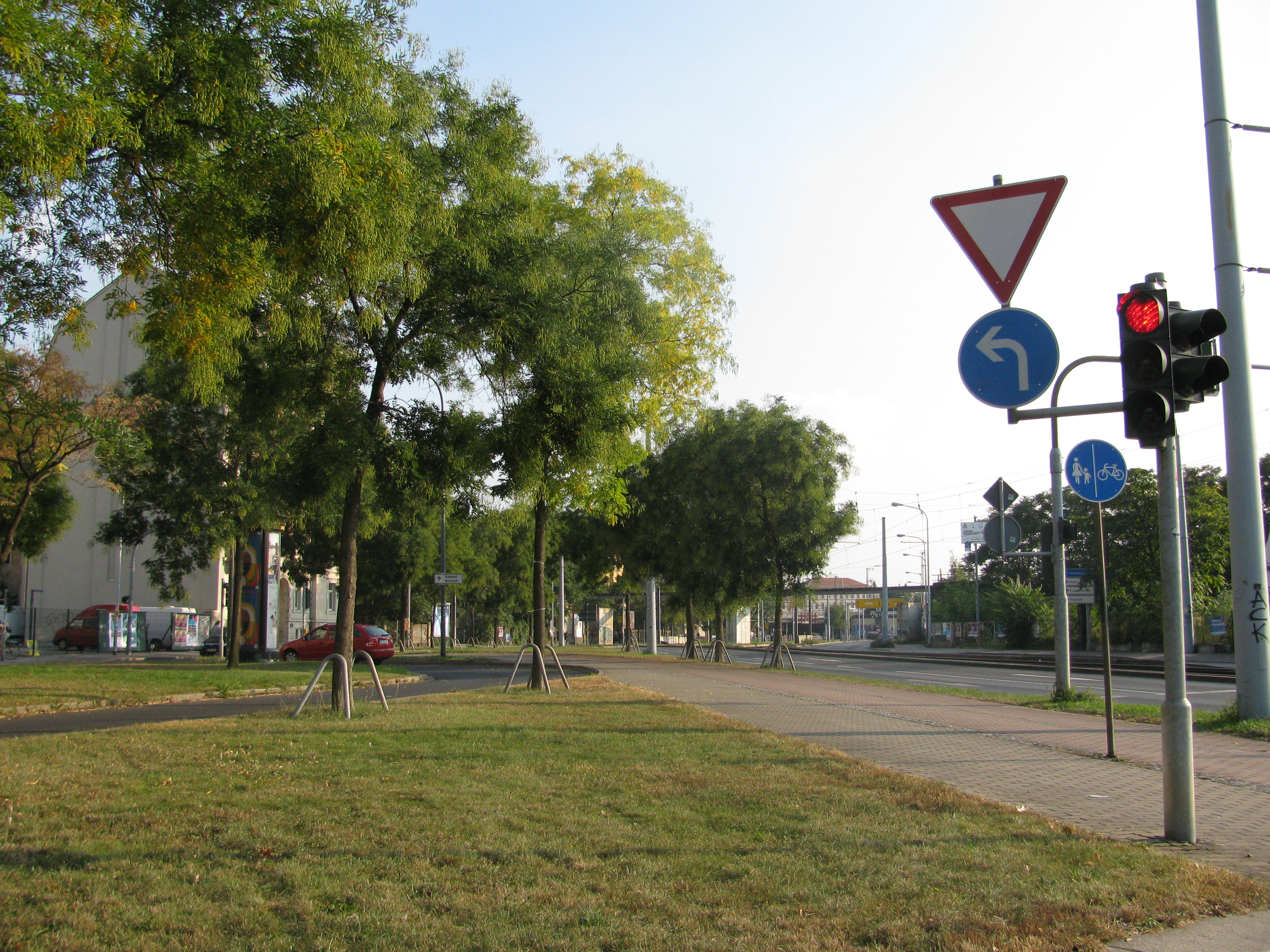 Hansastraße, Kreuzungsbereich mit der Großenhainer Straße, Dresden, Blick nach Süden